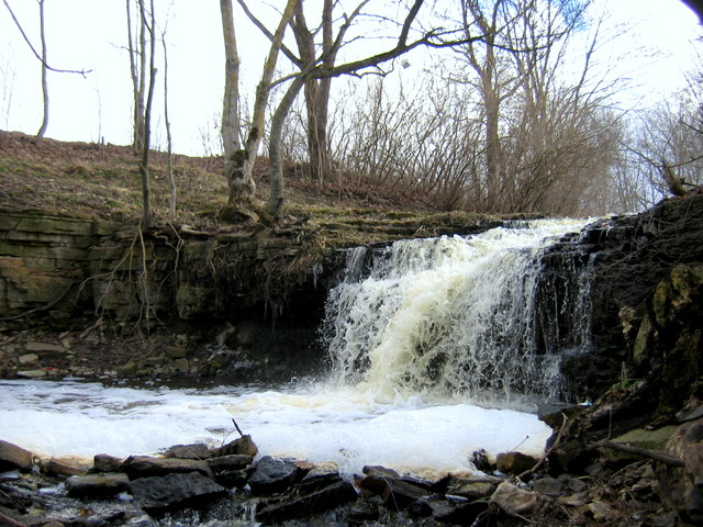 Tõrvajõe juga